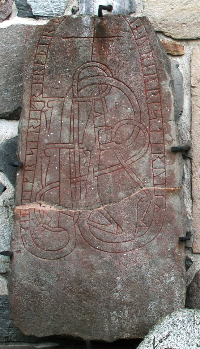 Husby-Sjuhundra kyrka, Norrtälje kommun, Diocese of Uppsala, Sweden. Runestone U541